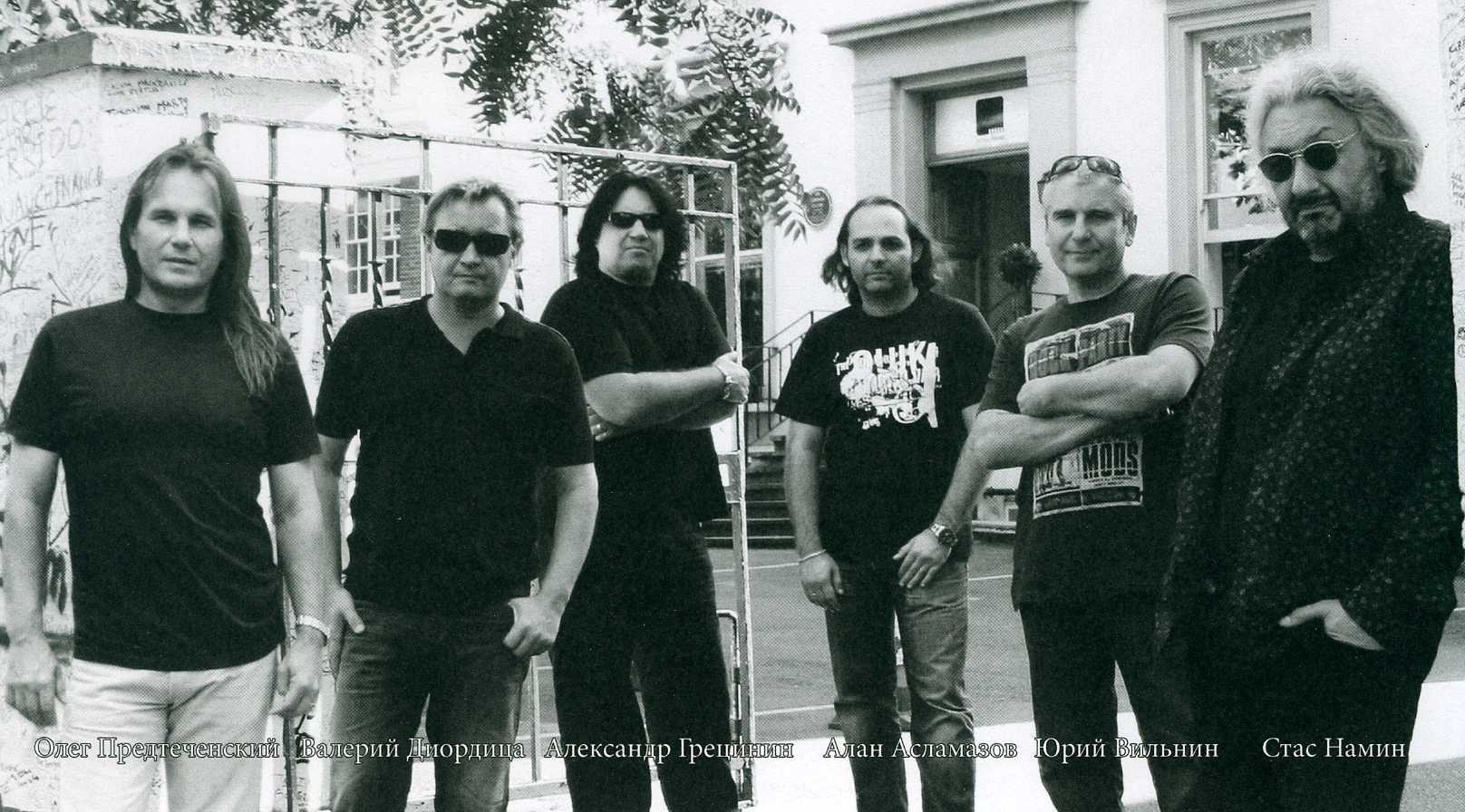 Группа «Цветы» у входа в студию Abbey Road, Лондон 2009 г.